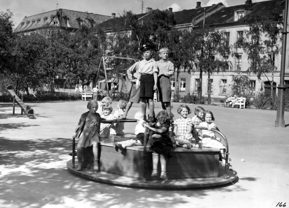 I 1935 var det lekeplass på Th. Kittelsens plass. Ukjent fotograf. Fra Park- og idrettsvesenets samling hos Oslo byarkiv.